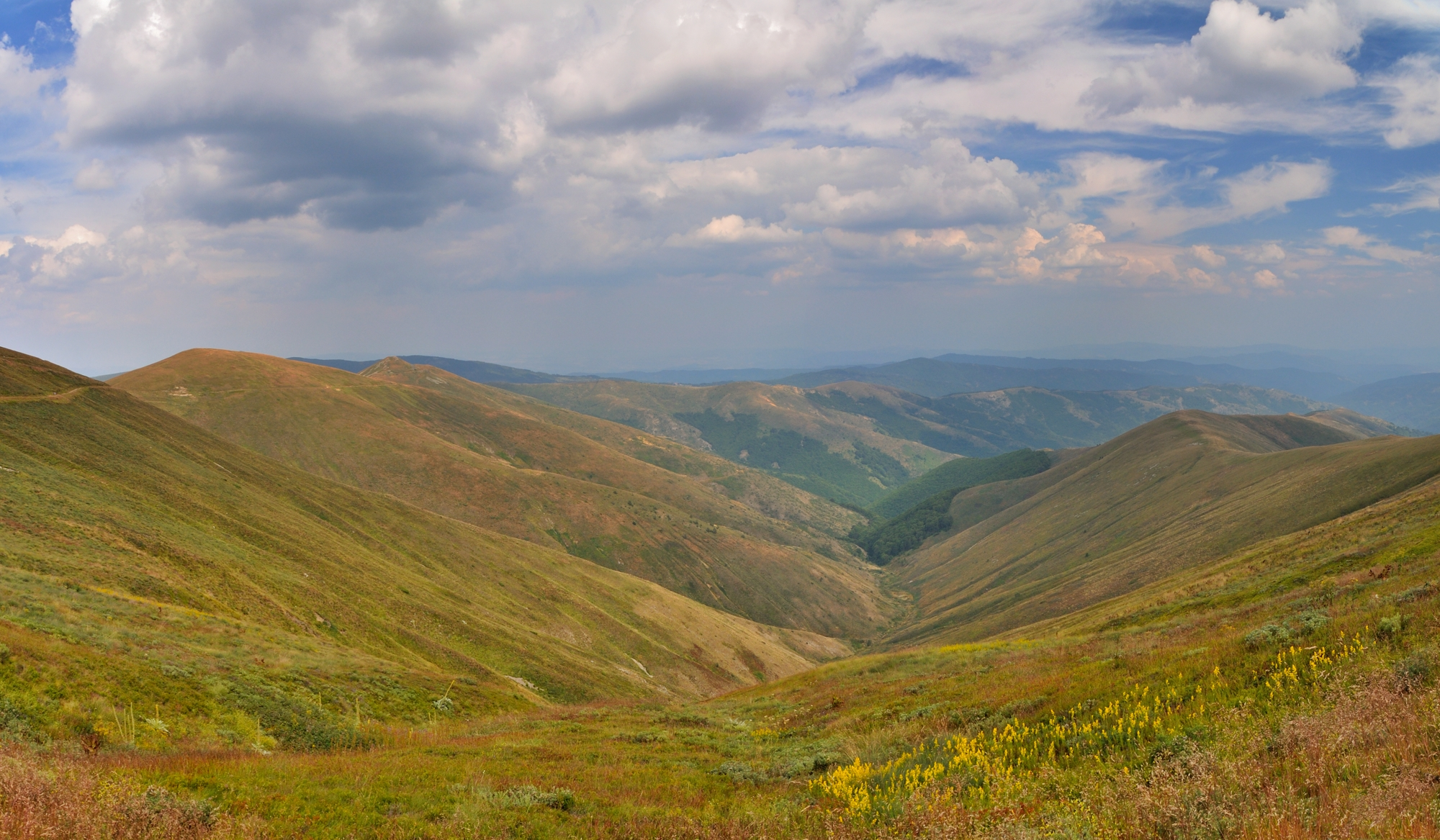 Църна река